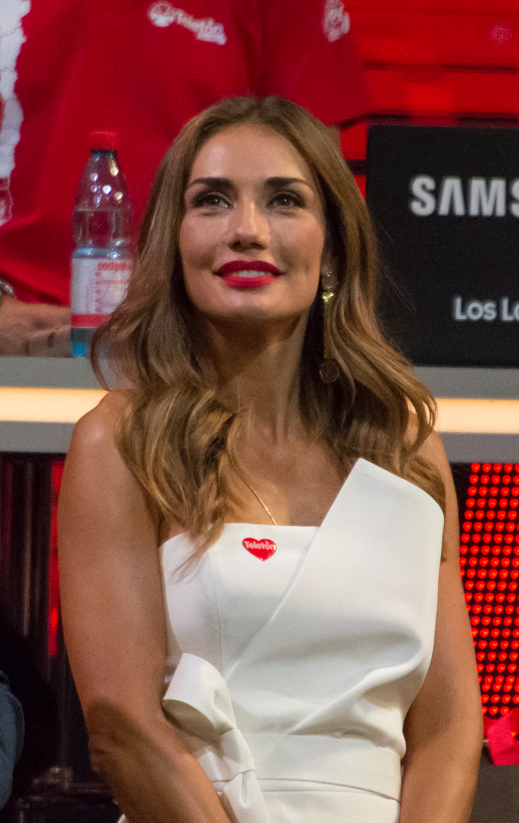 Carolina de Moras, Teletón 2018, Teatro Teletón, Santiago, Chile.